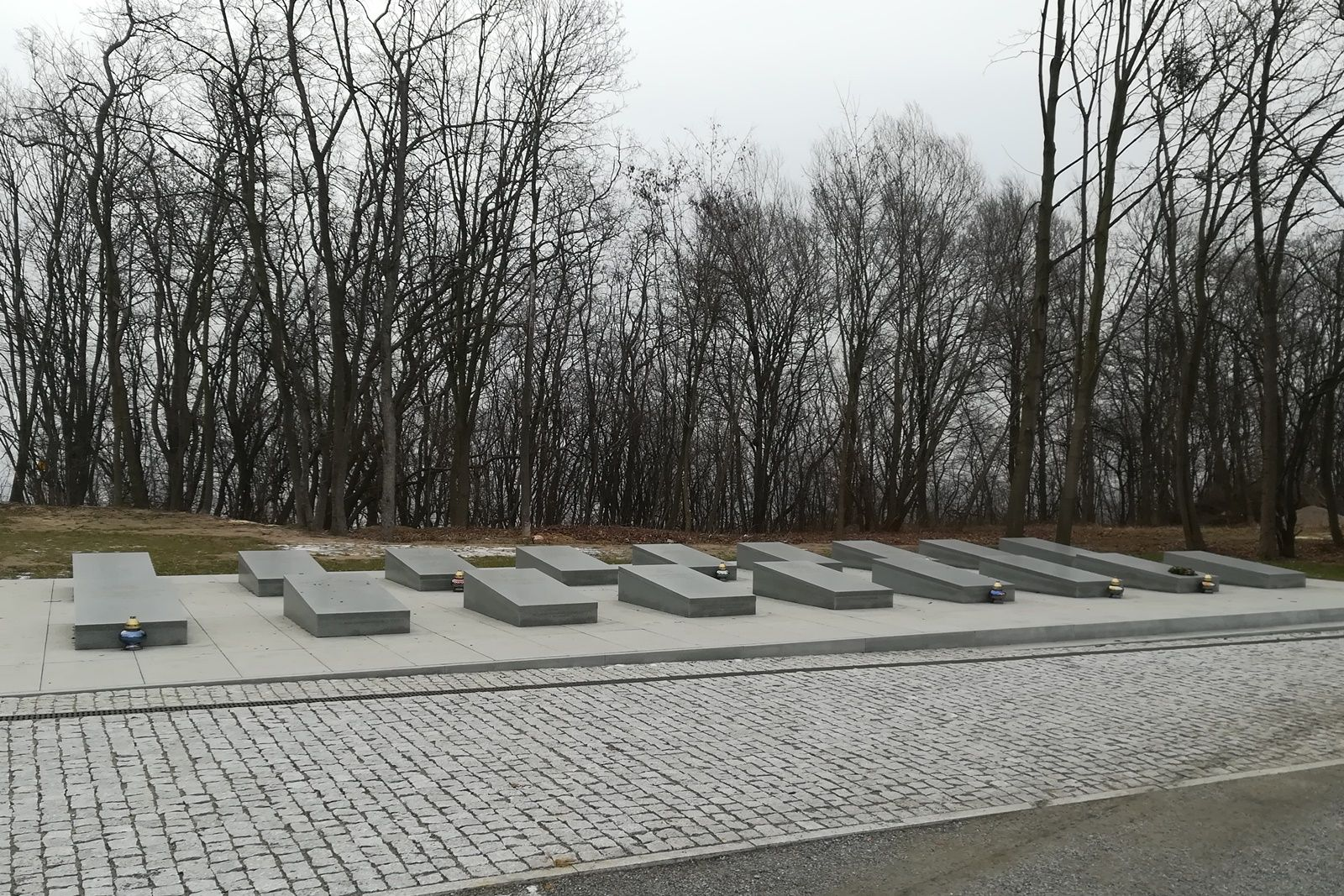 Cmentarz Marynarki Wojennej_Kwatera Pamięci_nagrobki_ofiar_zbrodni_stalinowskich